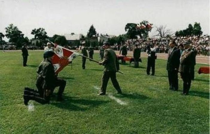 Garnizon Przasnysz, 1996r. Wręczenie sztandaru dla 20 OSSR (JW 3832)